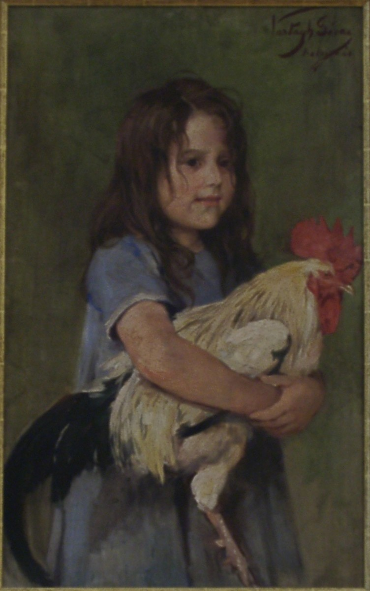 Vastagh Géza: Izi a kakassal